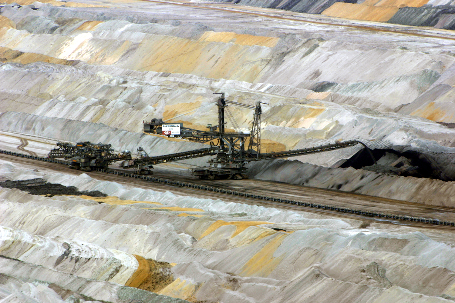 Absetzer 739 im Tagebau Hambach